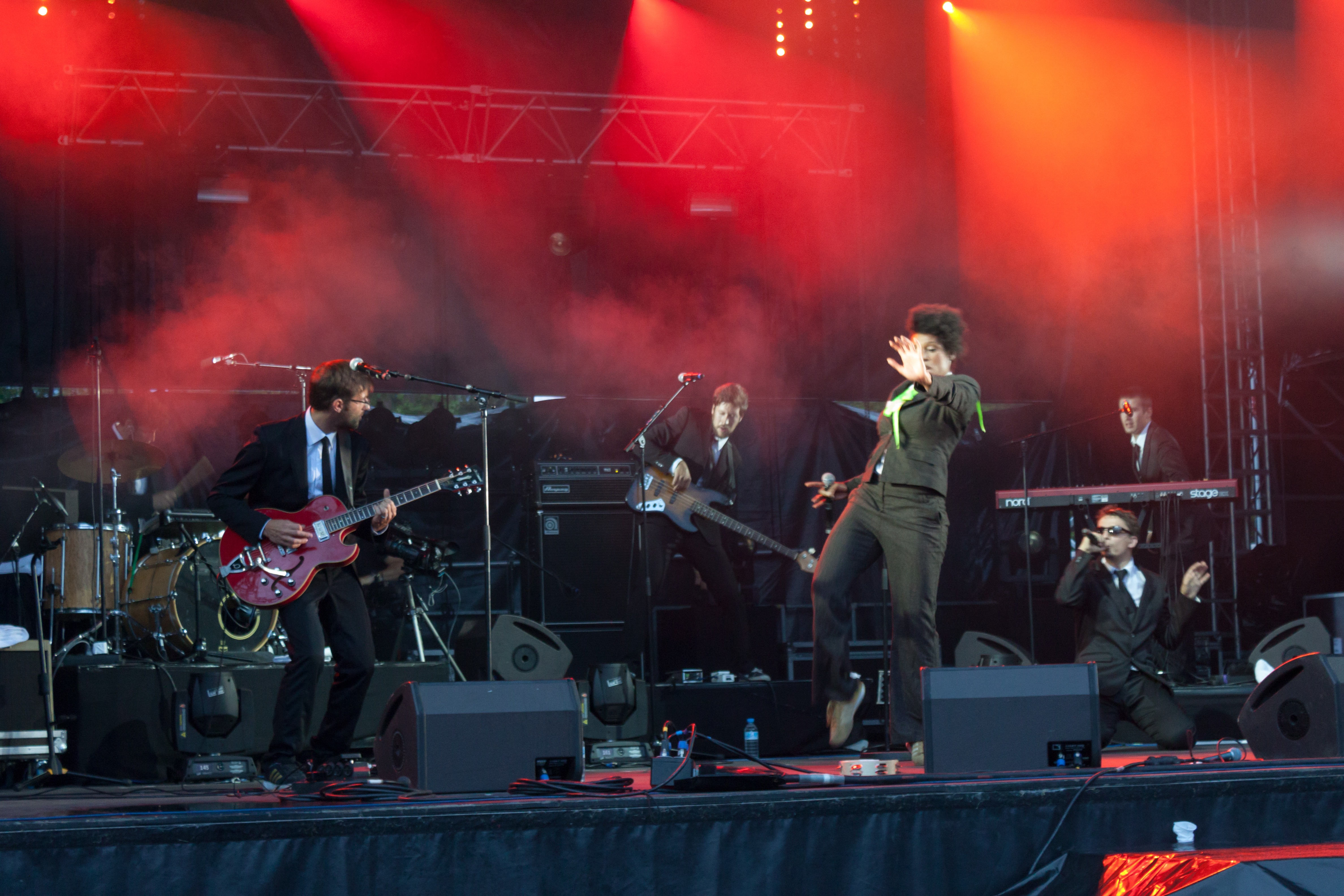 Sandra Nkaké au Mouv'Live de Grenoble.